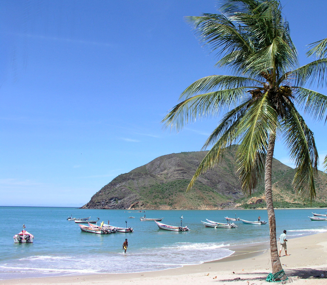 La Galera, Margarita, Nueva Esparta, Venezuela